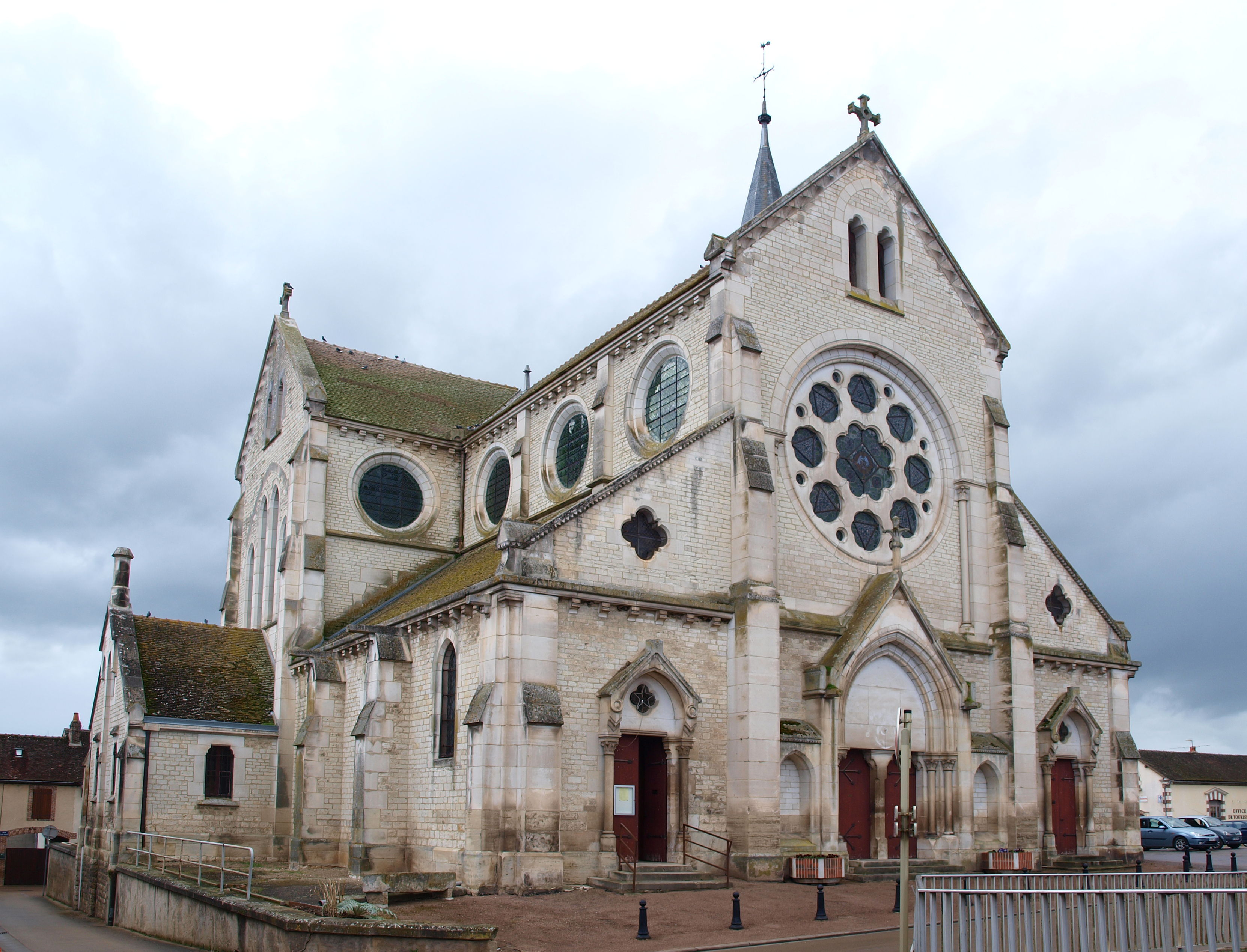 Église Saint-Martin d'Aillant-sur-Tholon (Yonne, France)